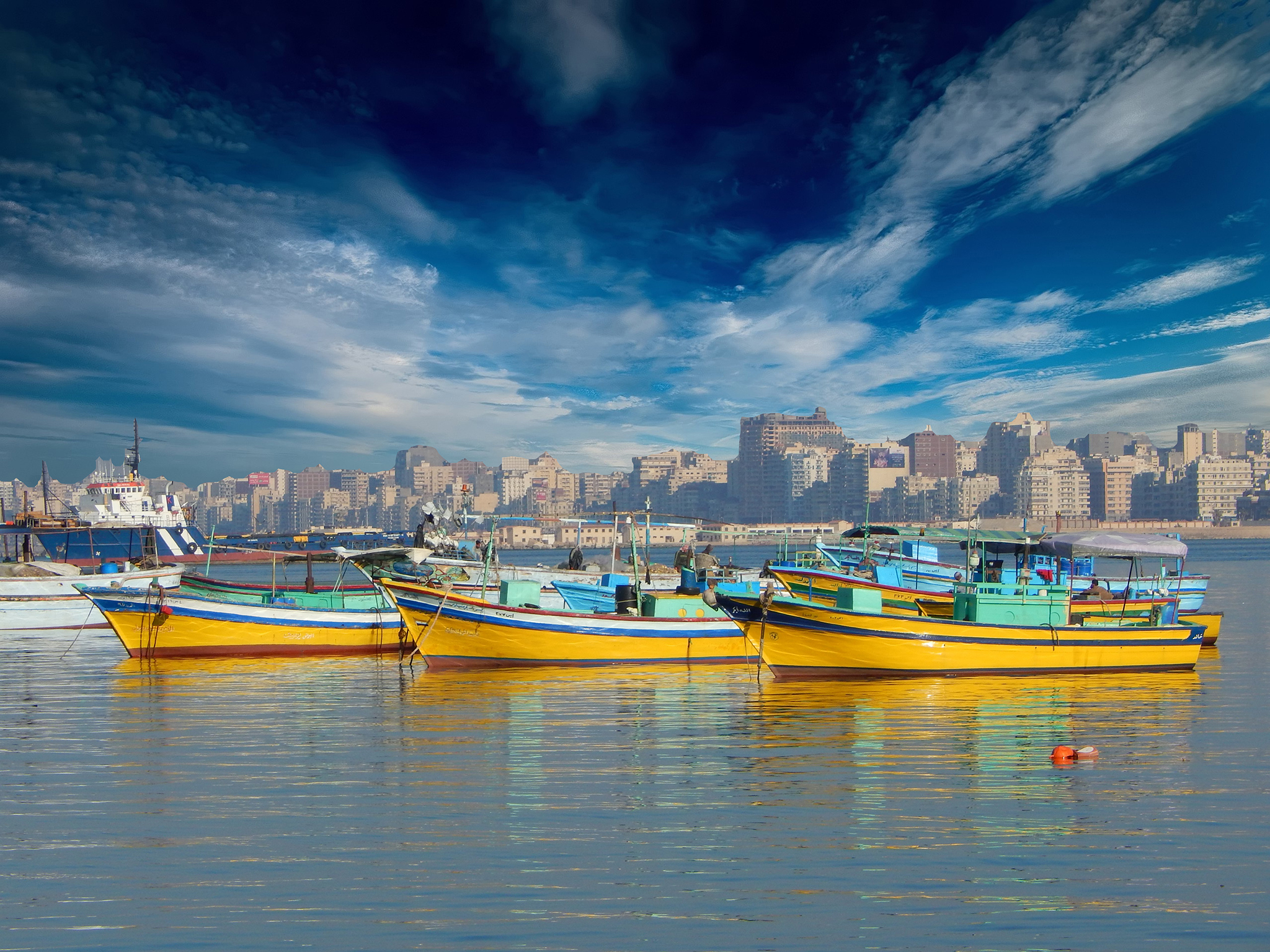 حي الجمرك هو حي شعبي قديم بمدينة الإسكندرية في مصر، يعرف الحي أيضاً باسم بحري. يتميز أهل الحي باحتفاظهم باللهجة السكندرية الشهيرة وكذلك العادات التي اندثرت من بقاع كثيرة من مدينة الإسكندرية